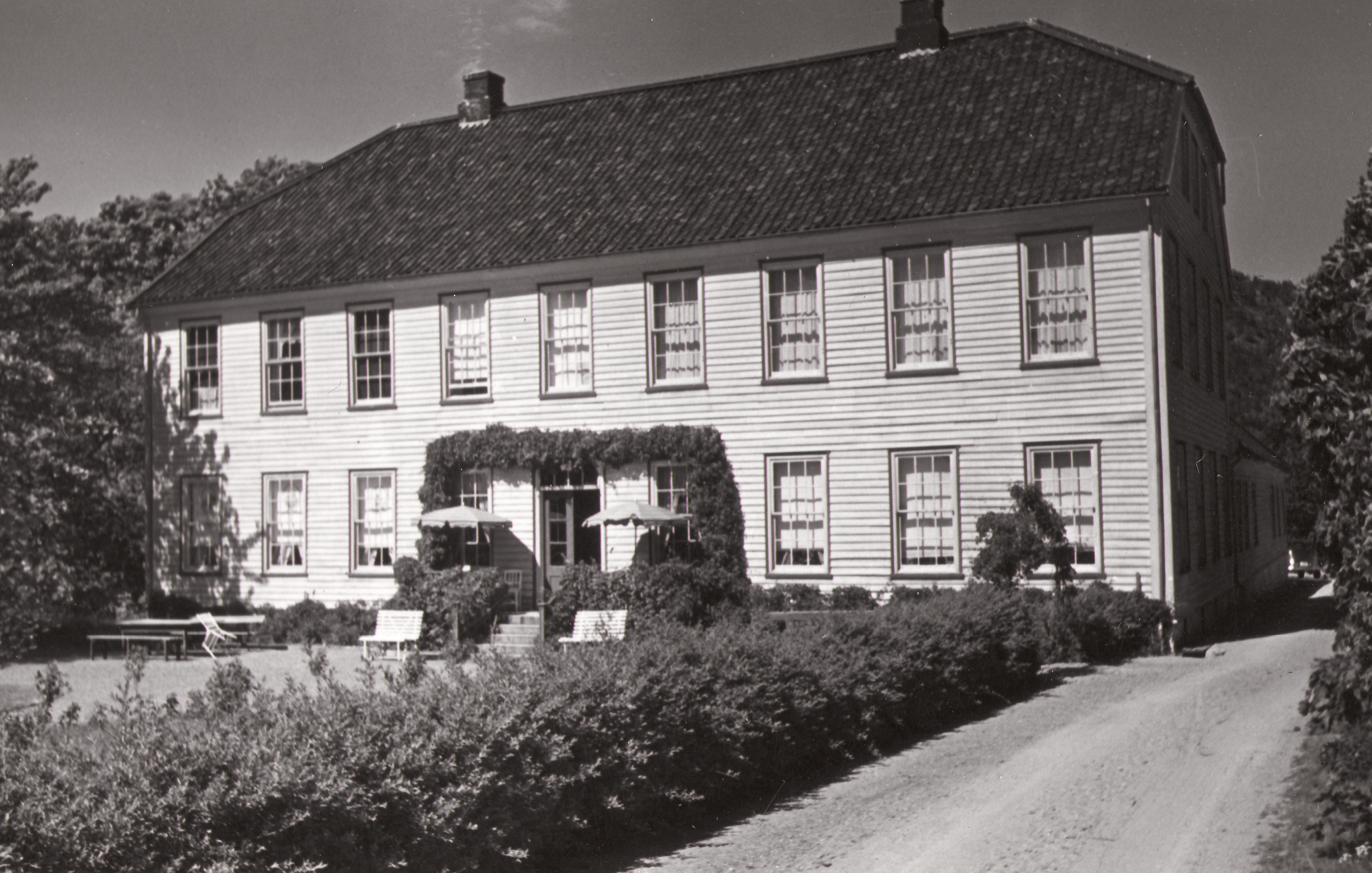 Boen i Tveit, Vest-Agder